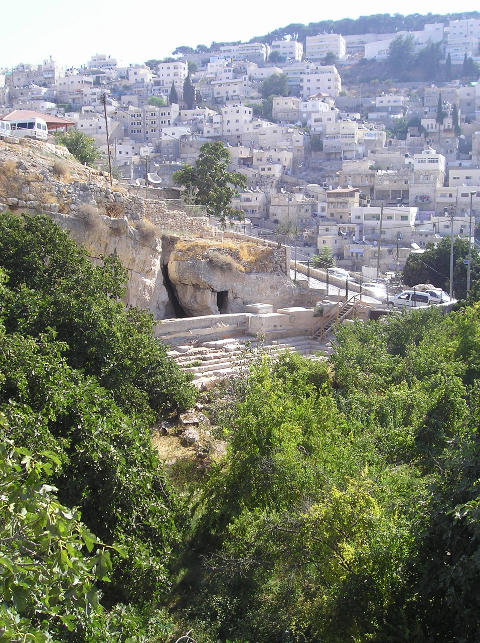 Pool of Siloam - Jerusalem (Photo: Abraham, September 2005)